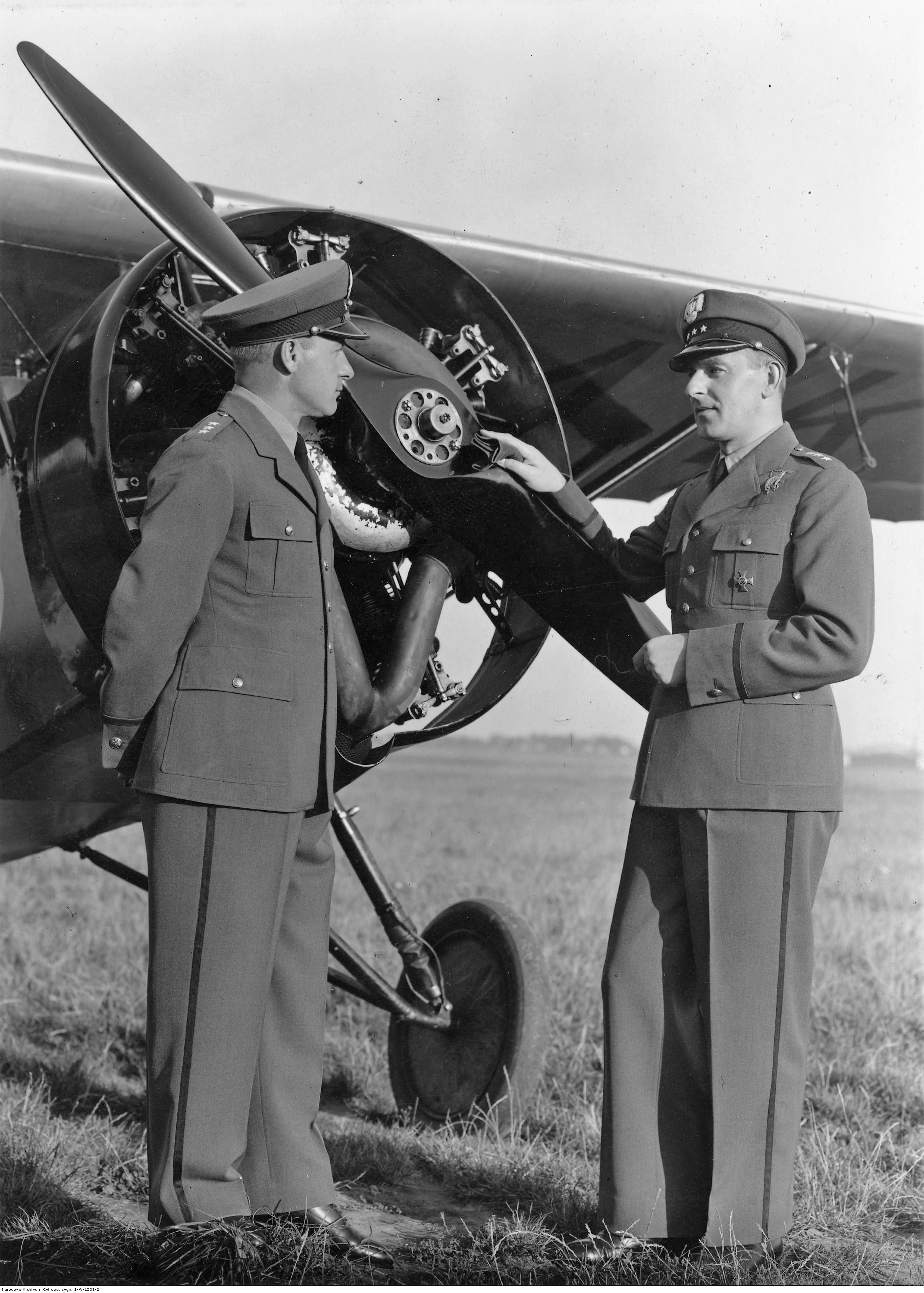 Nowe mundury polskich lotników 1936 r. Dwaj lotnicy przy samolocie. Koncern Ilustrowany Kurier Codzienny - Archiwum Ilustracji. Sygnatura: 1-W-1538-2